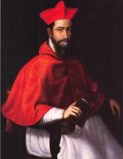 Cardinale Antonio Maria Galli (1553-1620)